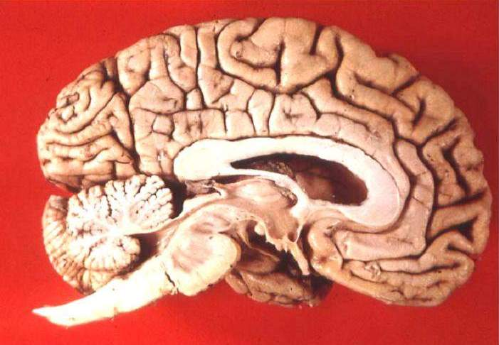 Human brain - midsagittal cut